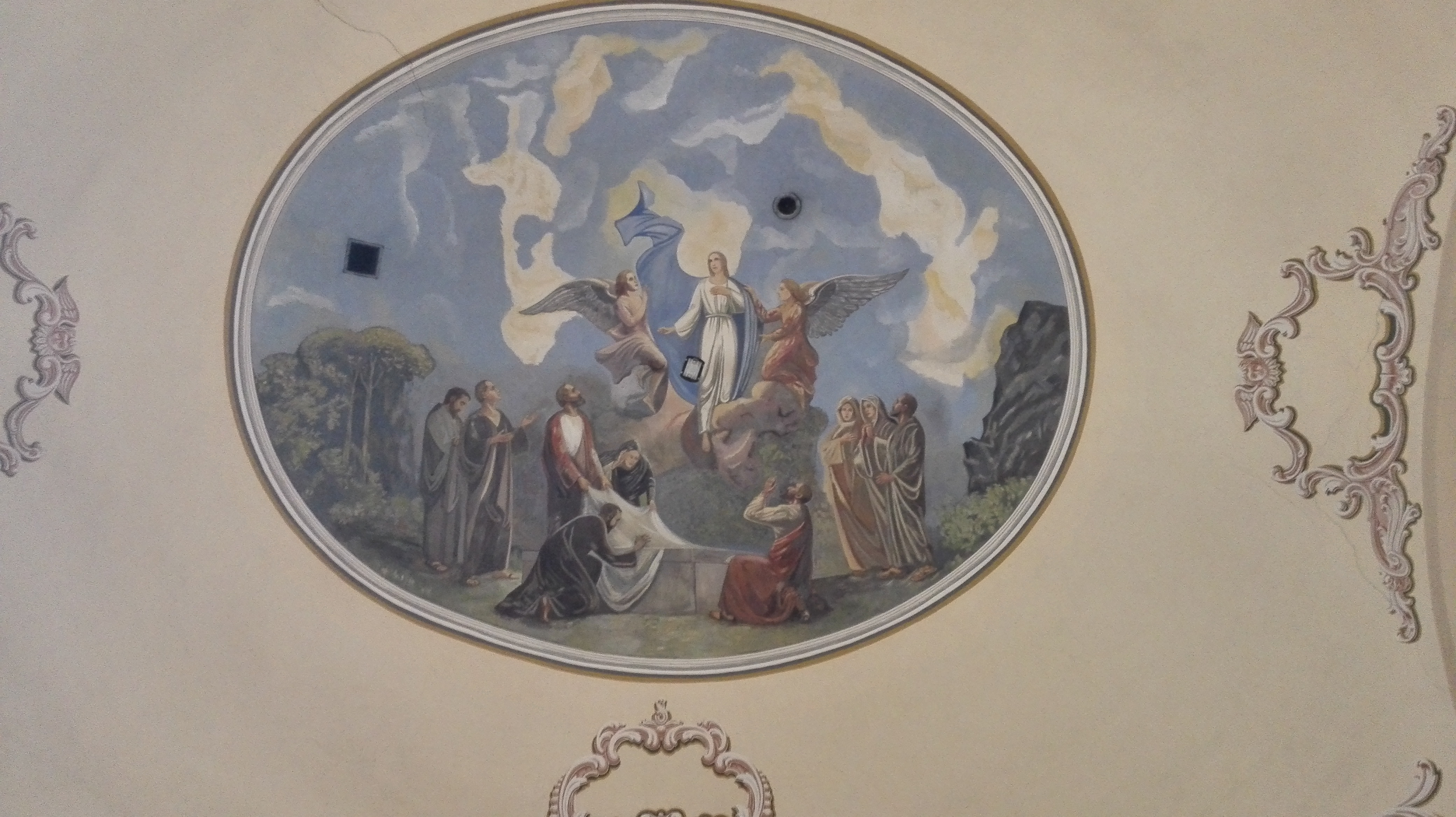 Prvá nástenná maľba kostola sv. Ondreja v Krásne nad Kysucou, vytvorenie: 1964-1966